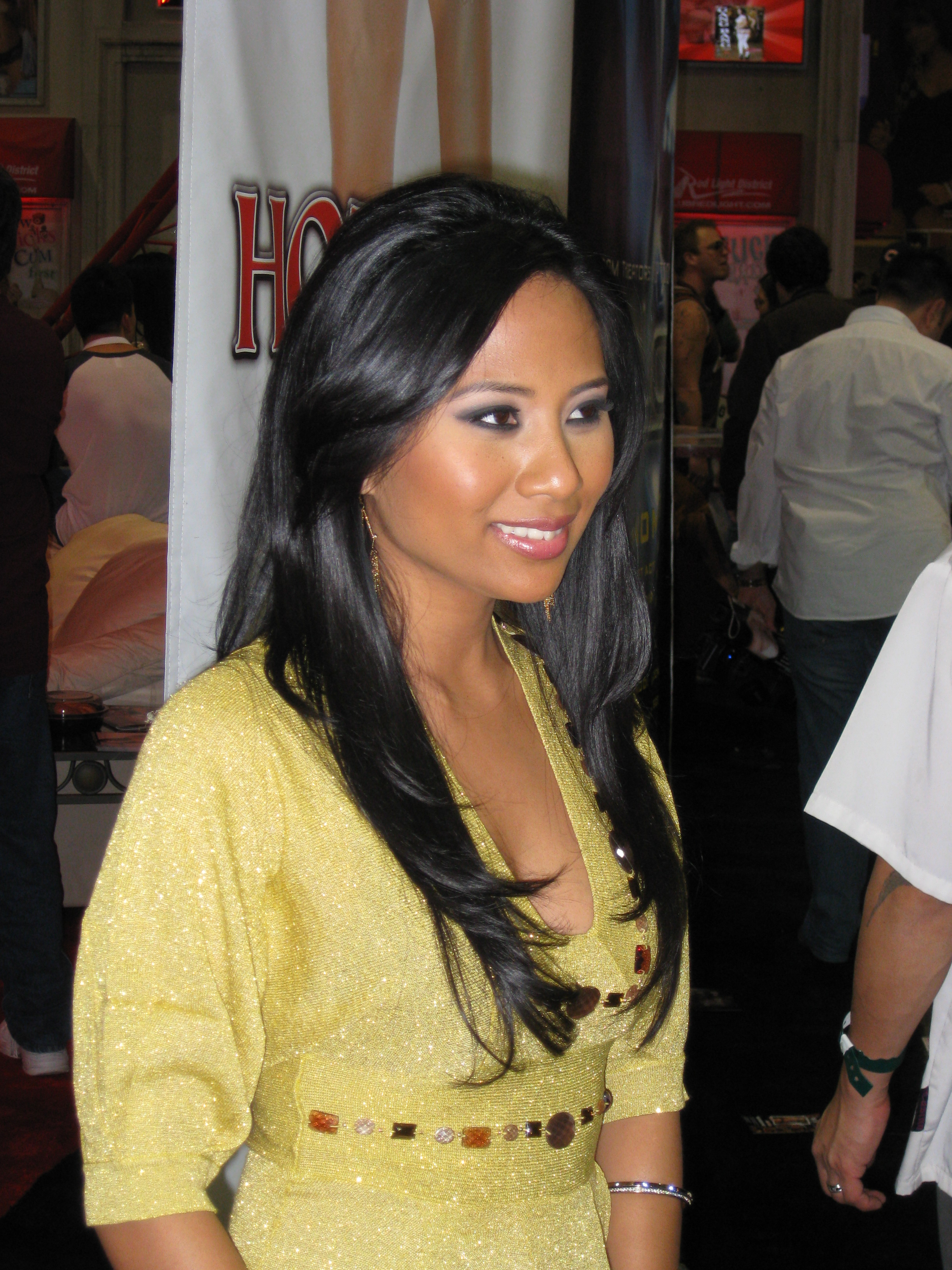 AEE2008_Day1 055